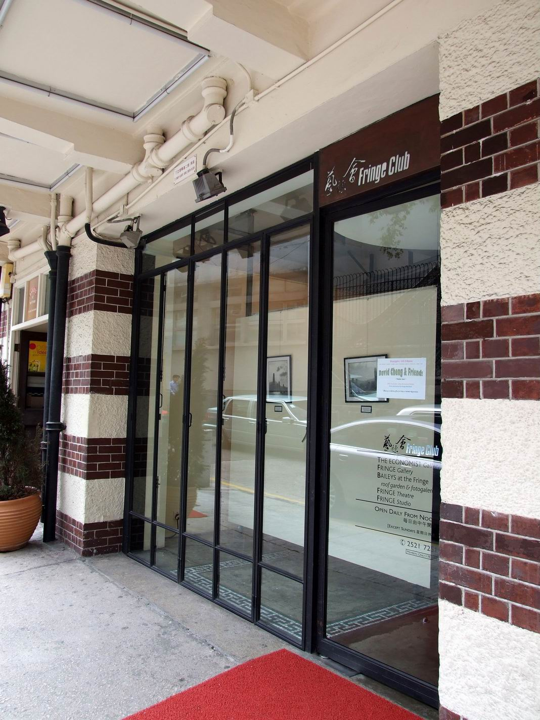 藝穗會入口